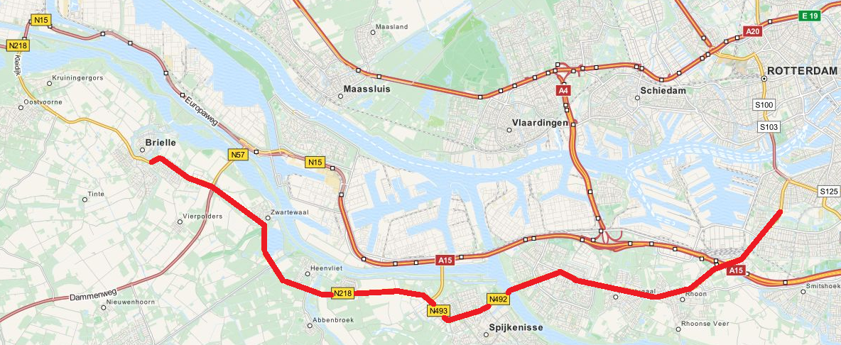 Groene Kruisweg